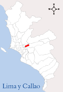 Localización del Distrito de Santa Anita